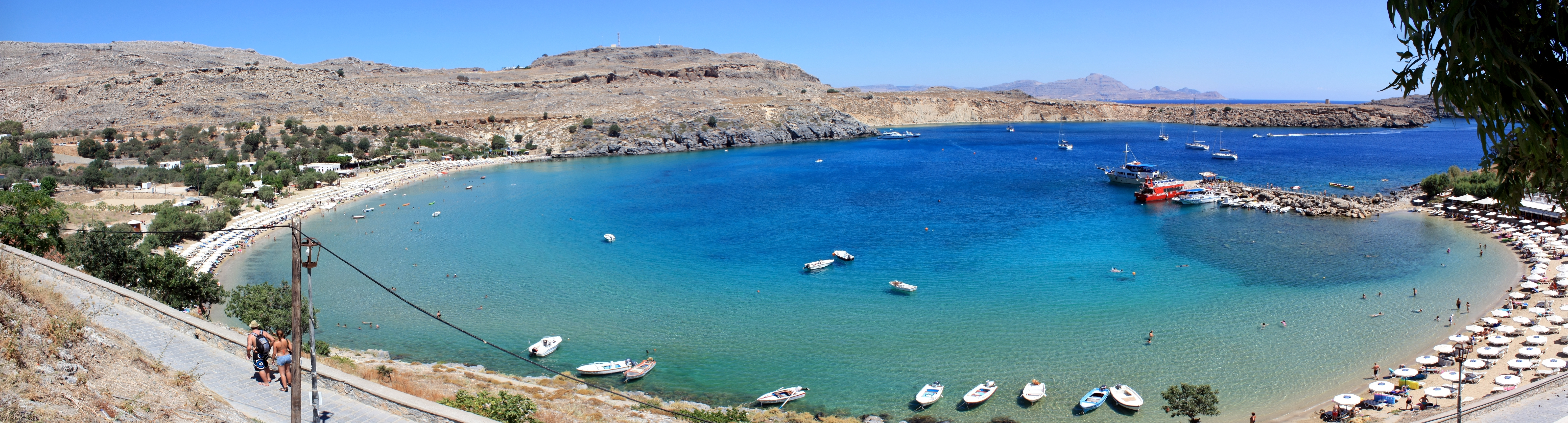 Panorama de la crique de Lindos sur l'île de Rhodes.